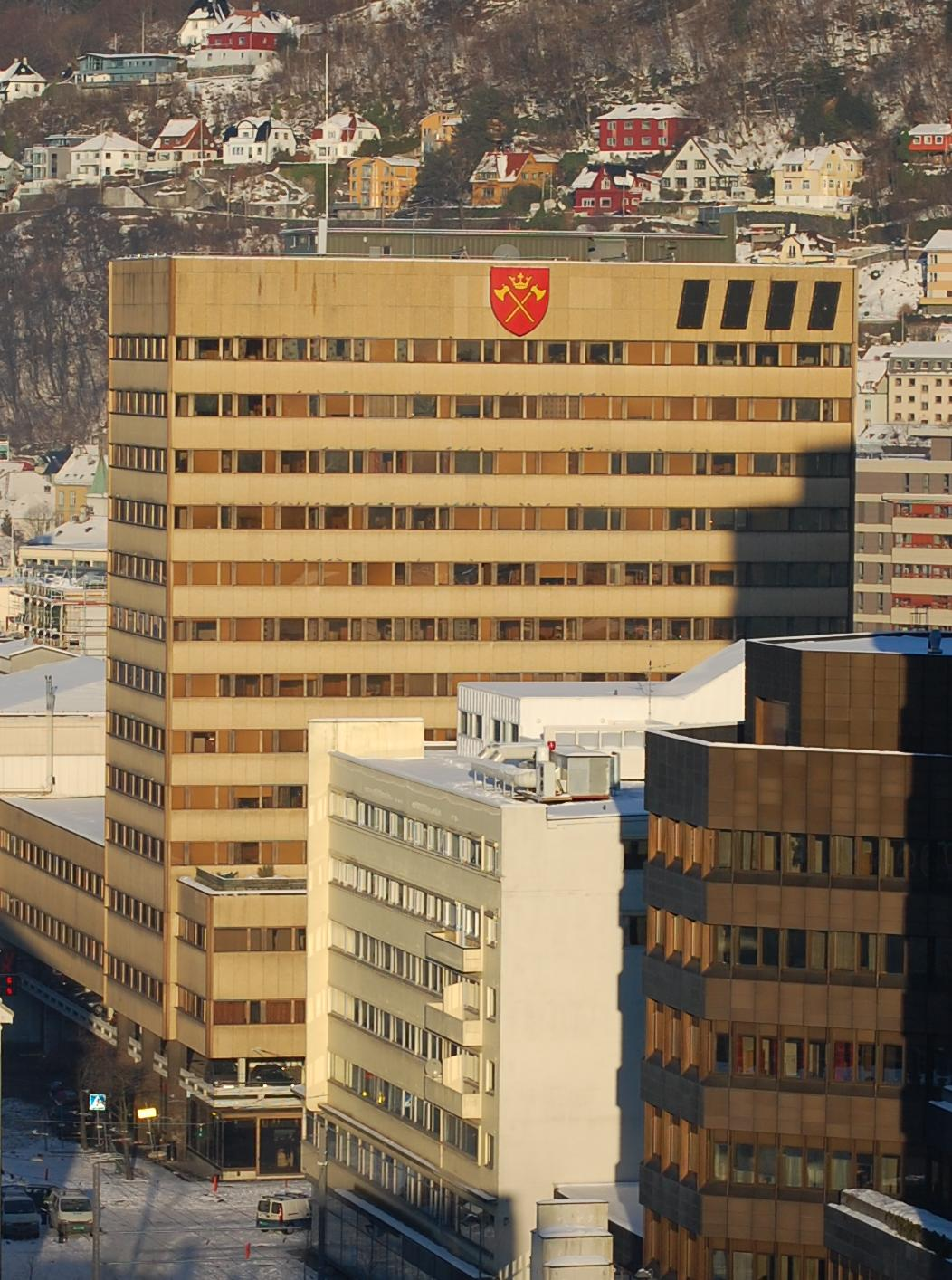 Hordaland fylkeskommune Agnes Mowinckels gate 5 5008 Bergen